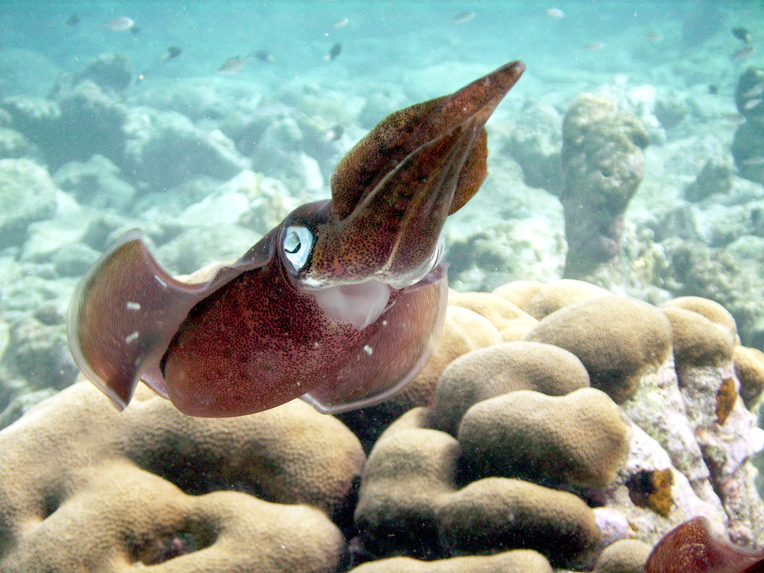 Karibischer Riffkalmar